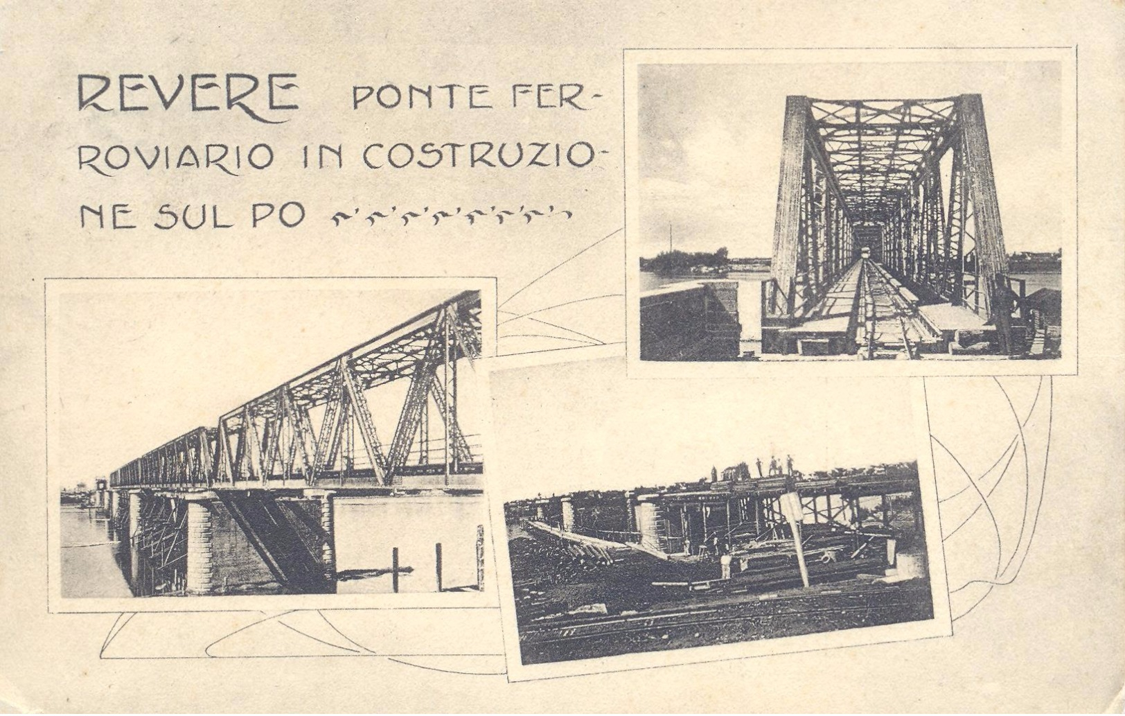 Revere, ponte ferroviarrio in costruzione sul Po